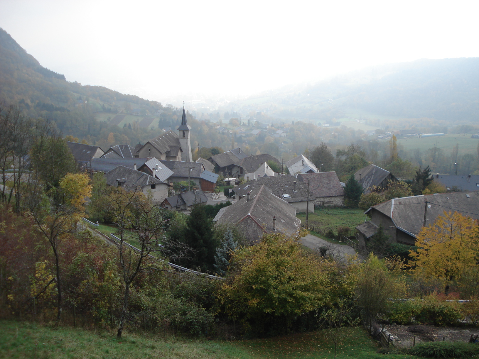 Chef-lieu de la commune de Vérel-Pragondran